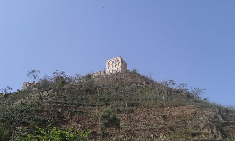 جبل يفوز